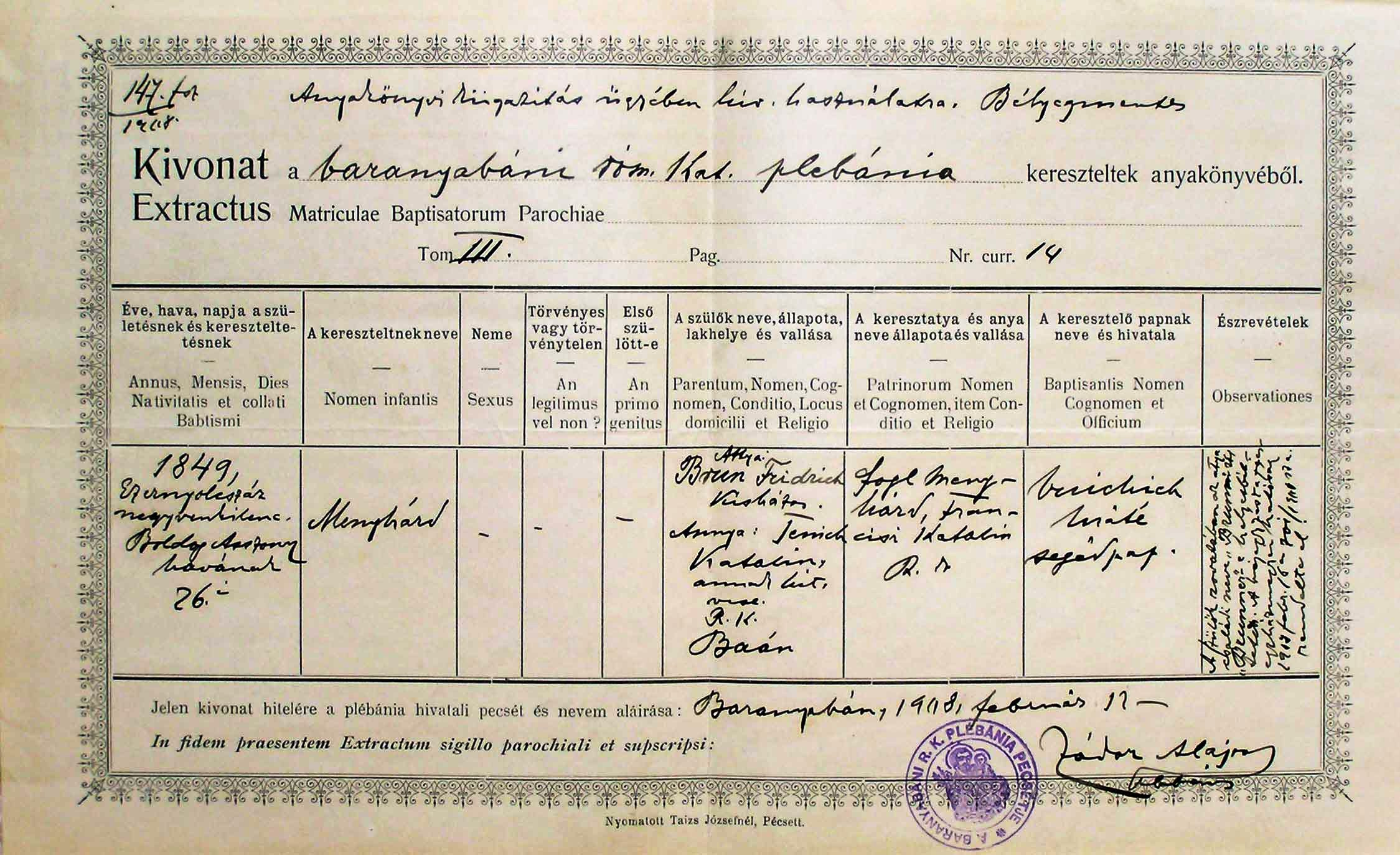 A fénykép egy az 1918-ban Baranyabán akkori plébános-esperese, Zádor Alajos által helyben kiállított, 1849-es keresztelési eseményre utaló, s "anyakönyvi kiigazítás ügyében kért" keresztelési anyakönyvi kivonatot ábrázol.